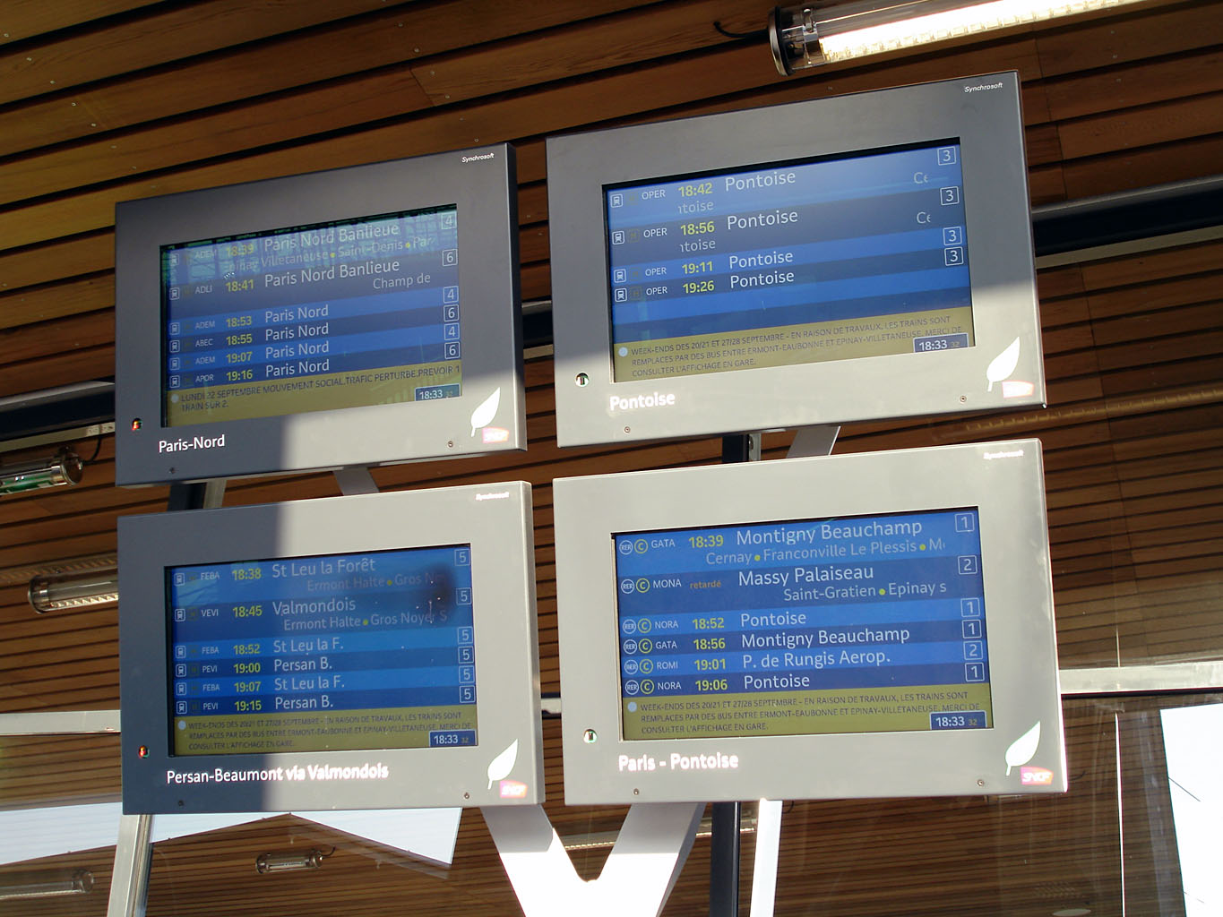 Gare d'Ermont - Eaubonne (Val-d'Oise)